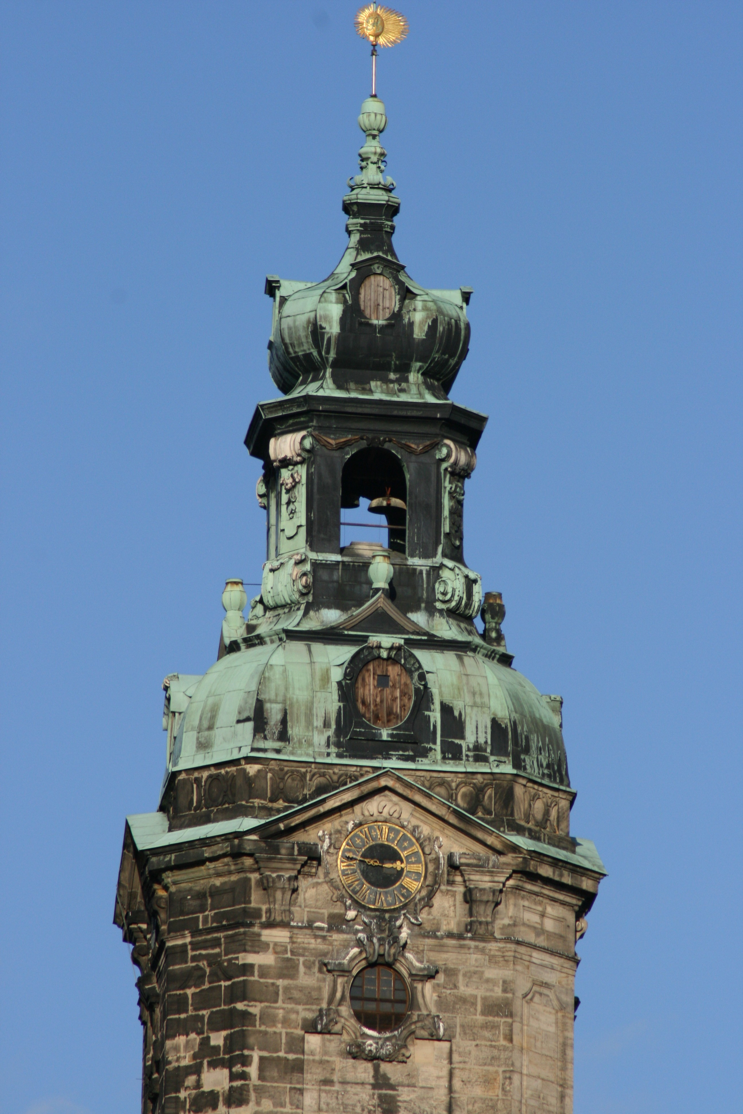 Turm der Heidecksburg, Rudolstadt, Thüringen, Deutschland